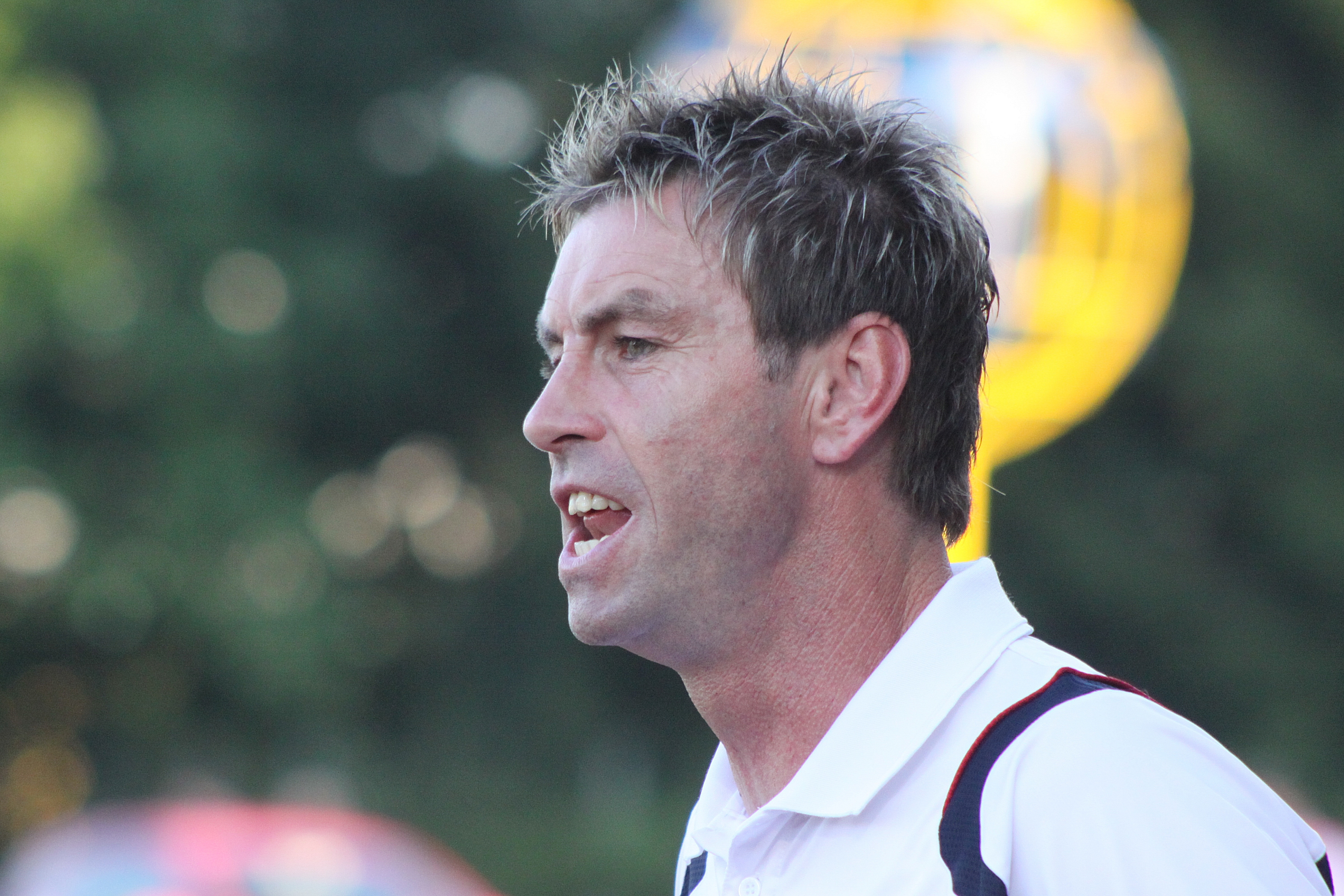 Bruno Friesenbichler, Fußballtrainer - TSV Hartberg (3)